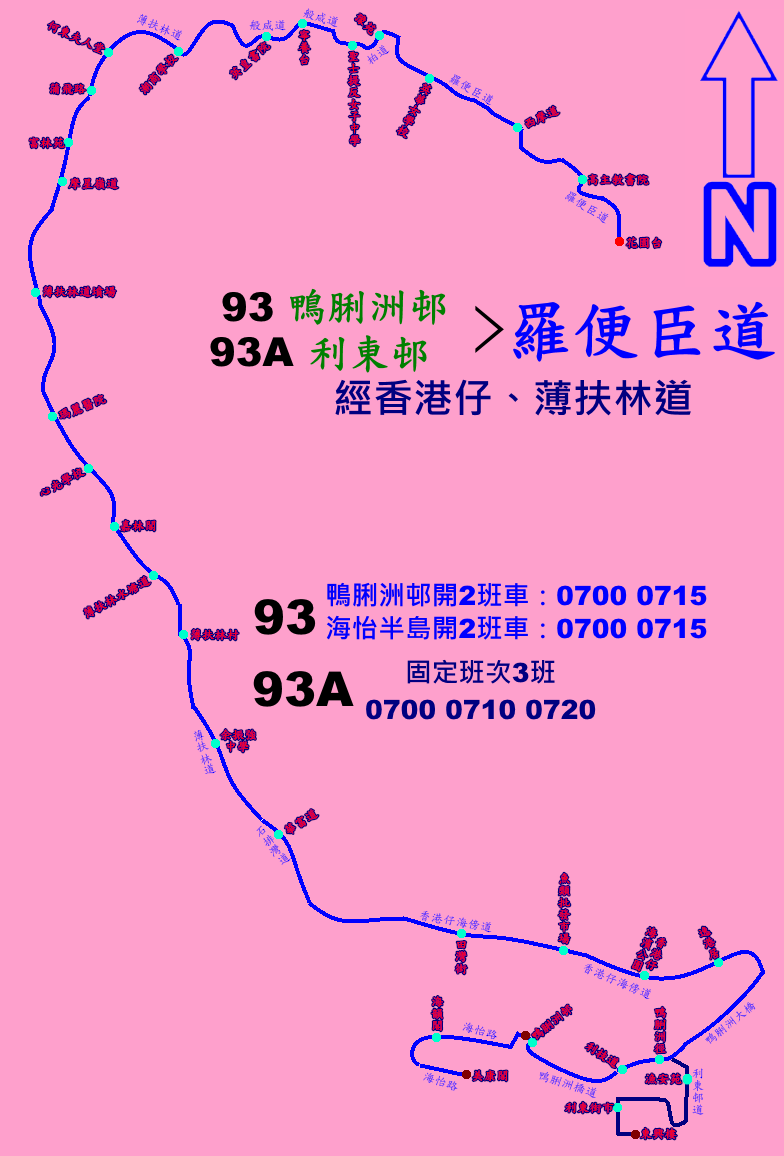 中文（香港）: 新巴93線及93A線的走線圖，當中深藍線表示93A的走線